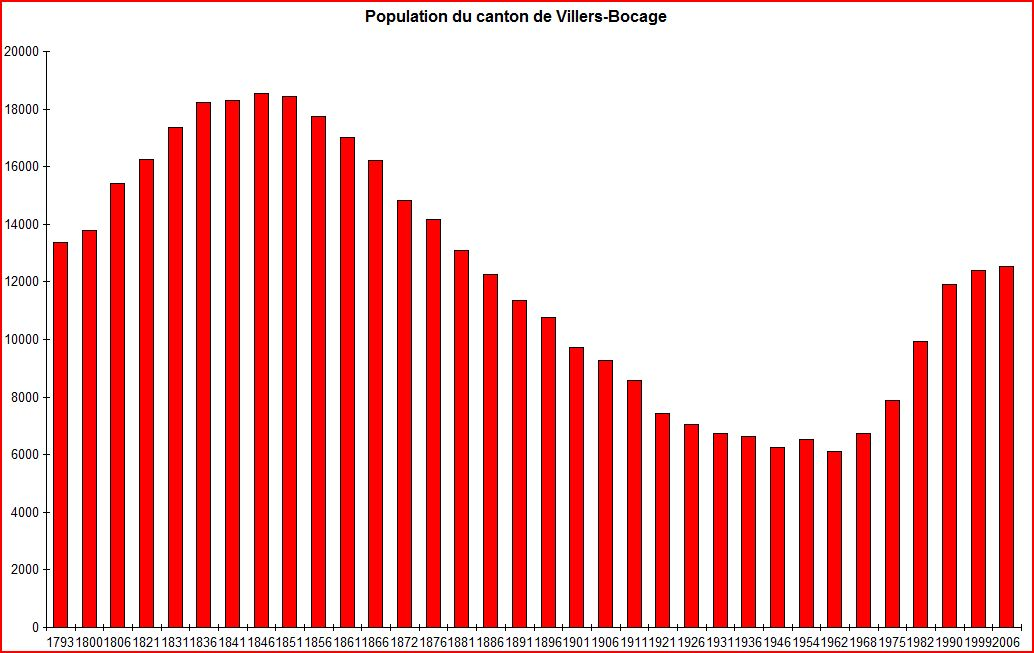 Histogramme de la population du canton de Villers-Bocage (Somme) de 1793 à 2006. Les vingt-quatre communes composant actuellement le canton, sont prises en compte.